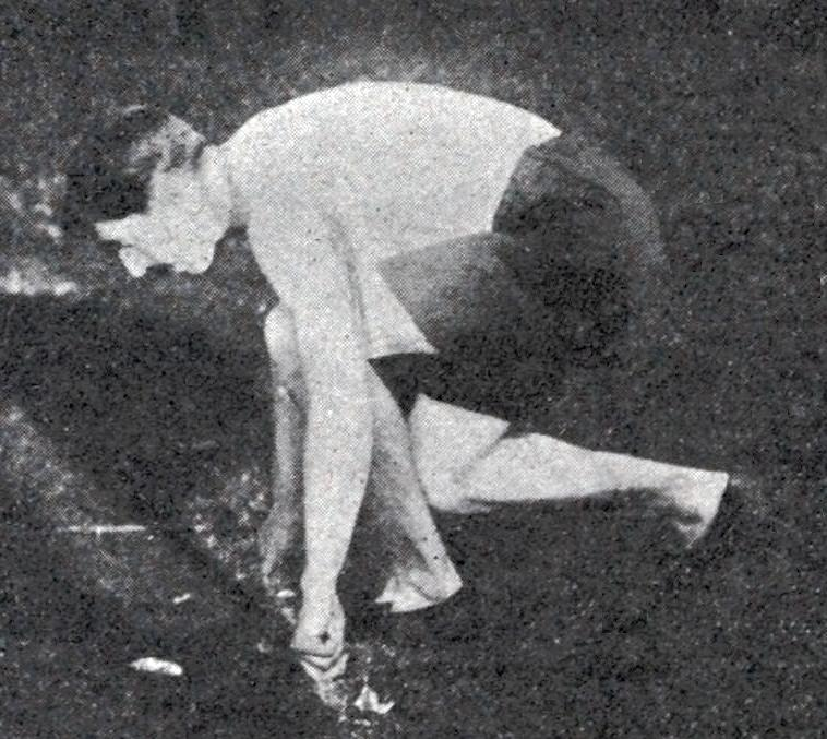 L'Américain Thibuld Hammond, du Racing Club de France, en 1901 (champion de France du 100 mètres en 1900 et 1901, plus alors du Prix Ravaut du RCF sur 200 mètres).